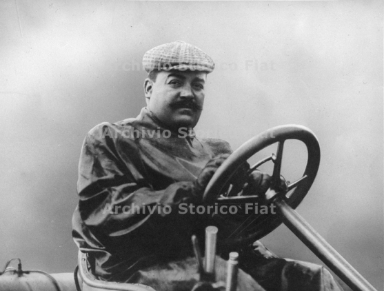 Vincenzo Lancia al volante di un'autovettura, 1900-1909 (Archivio e centro storico Fiat, Fondo Lancia)